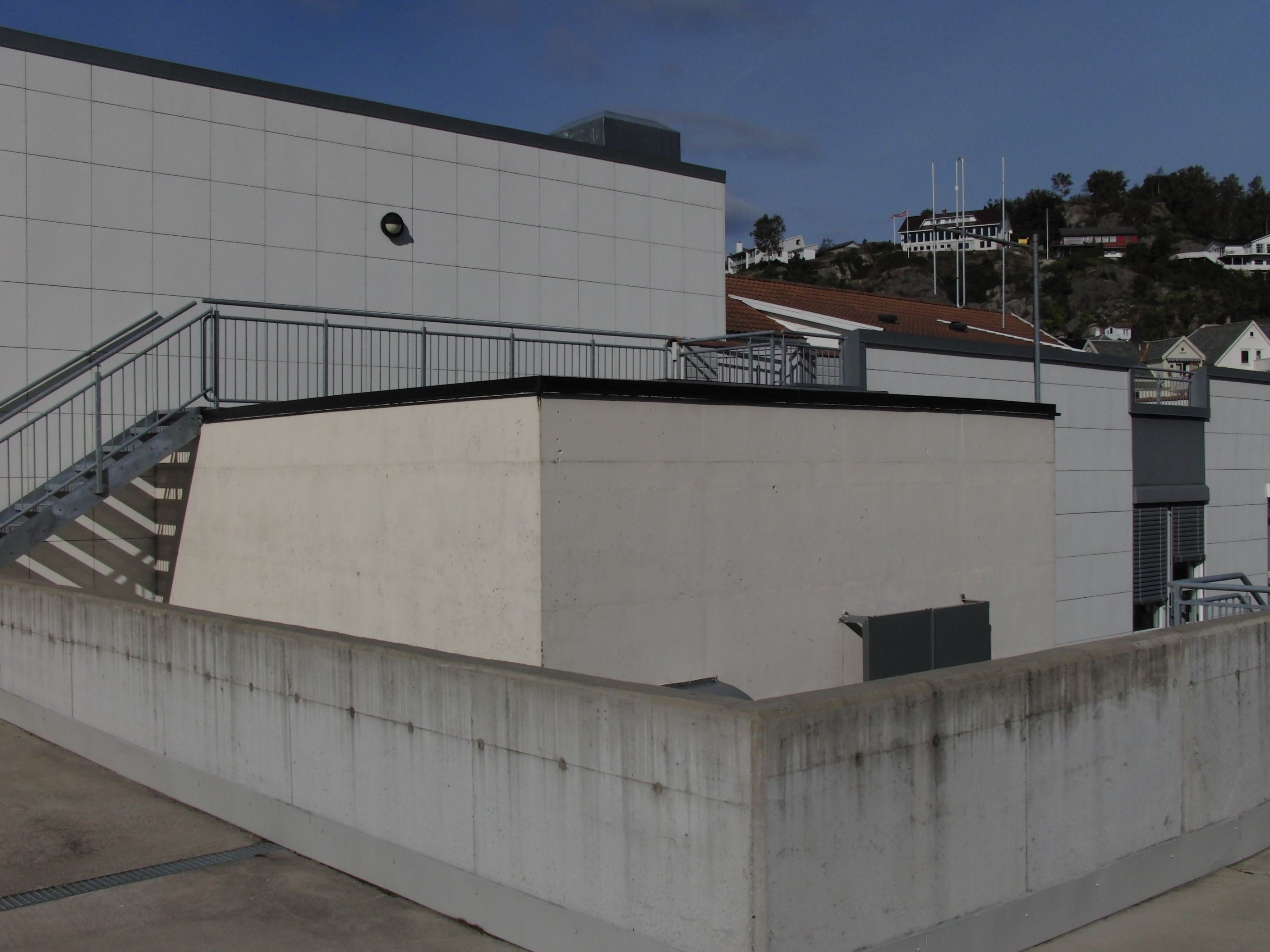 Svanedal kraftverk